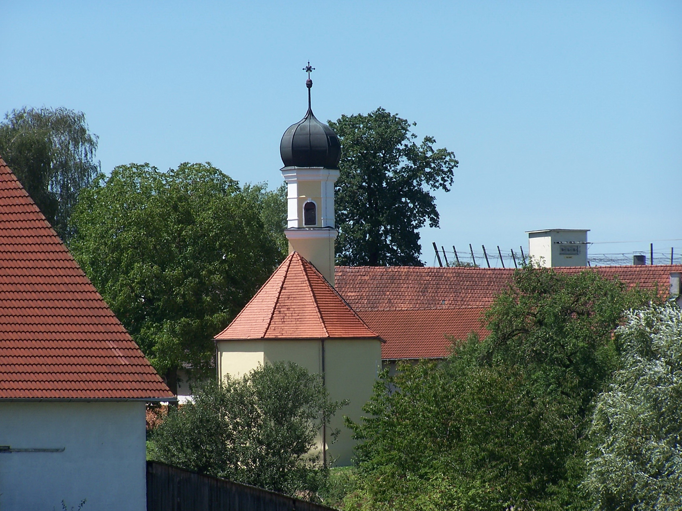 Obersüßbach, Ulrichsried. Filiankirche St. Ulrich. Spätgotische Anlage, barock ausgebaut; mit Ausstattung.